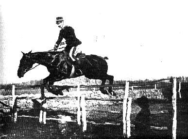 cap_F_Caprilli riding_Itala_jump